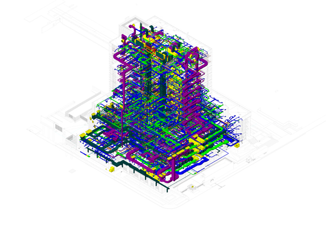 Syska Hennessy